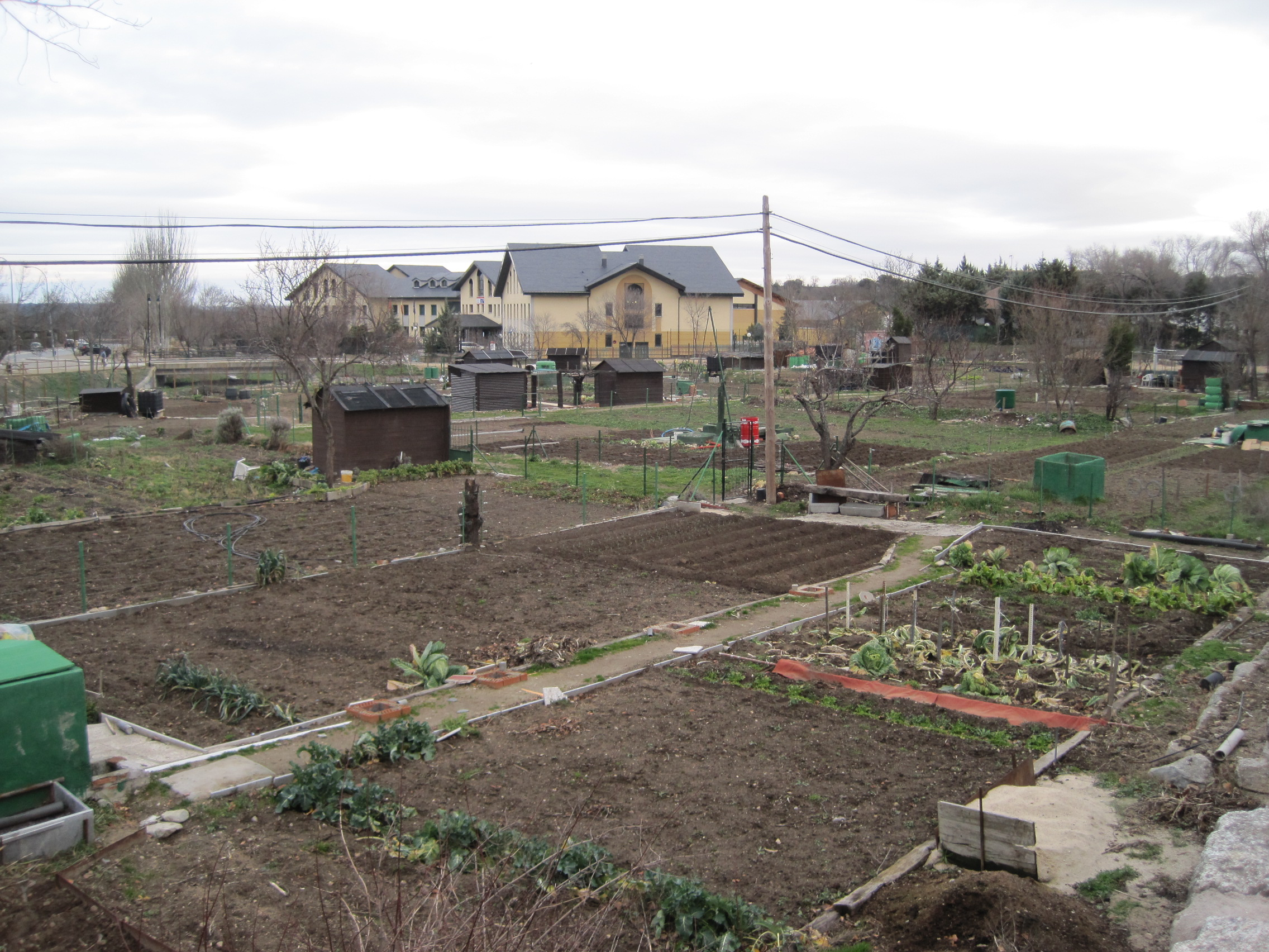 Huertos en El Escorial (Madrid, España).